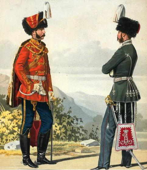 Штаб-офицер лейб-гвардии Гусарского и обер-офицер лейб-гвардии Гродненского гусарского полков. 18 декабря 1858 года.